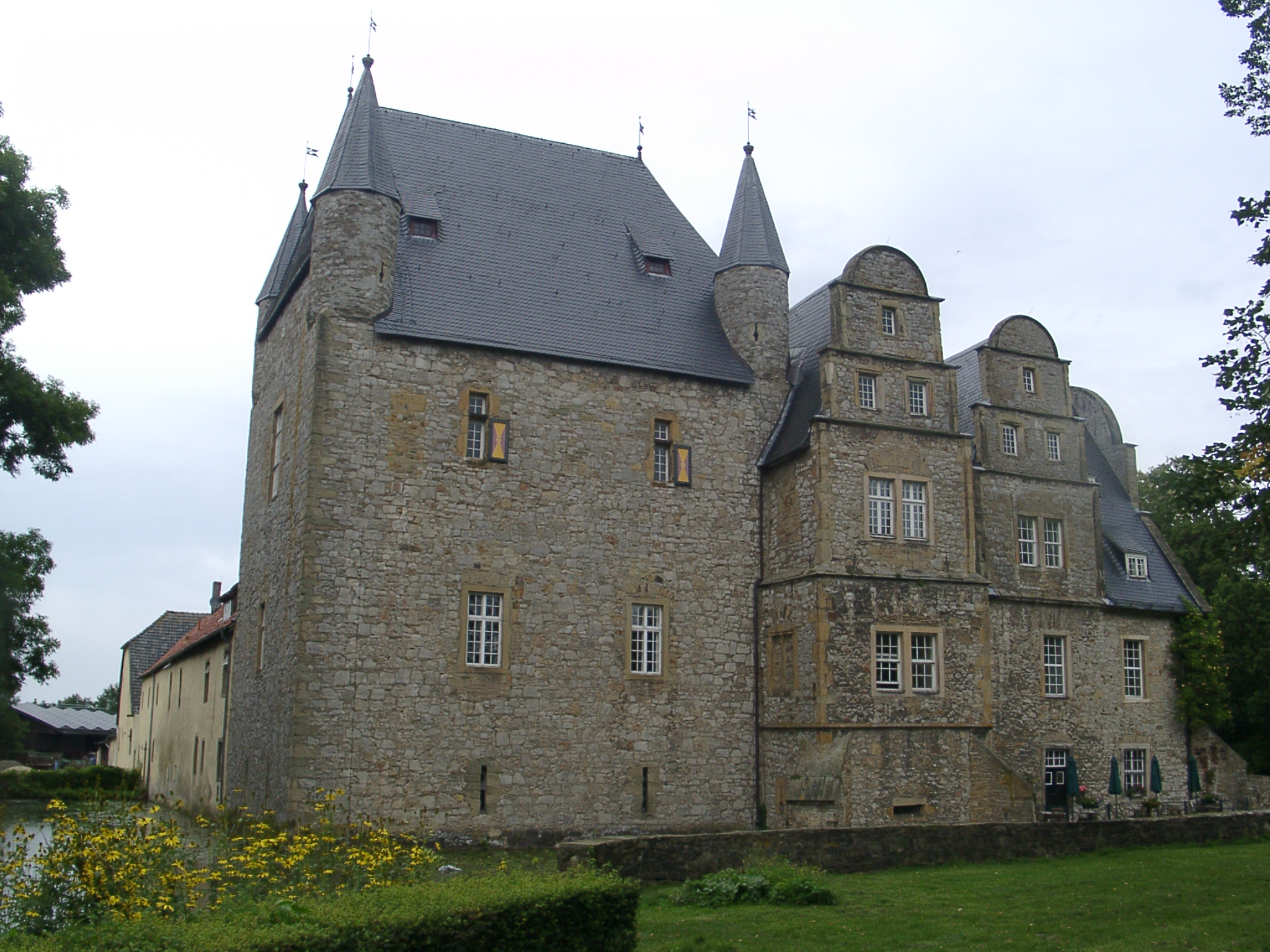 Schledenburg